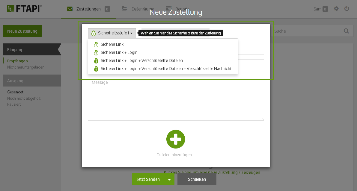 Auswahlmöglichkeit der Sicherheitsstufe vor dem Senden einer Datei.